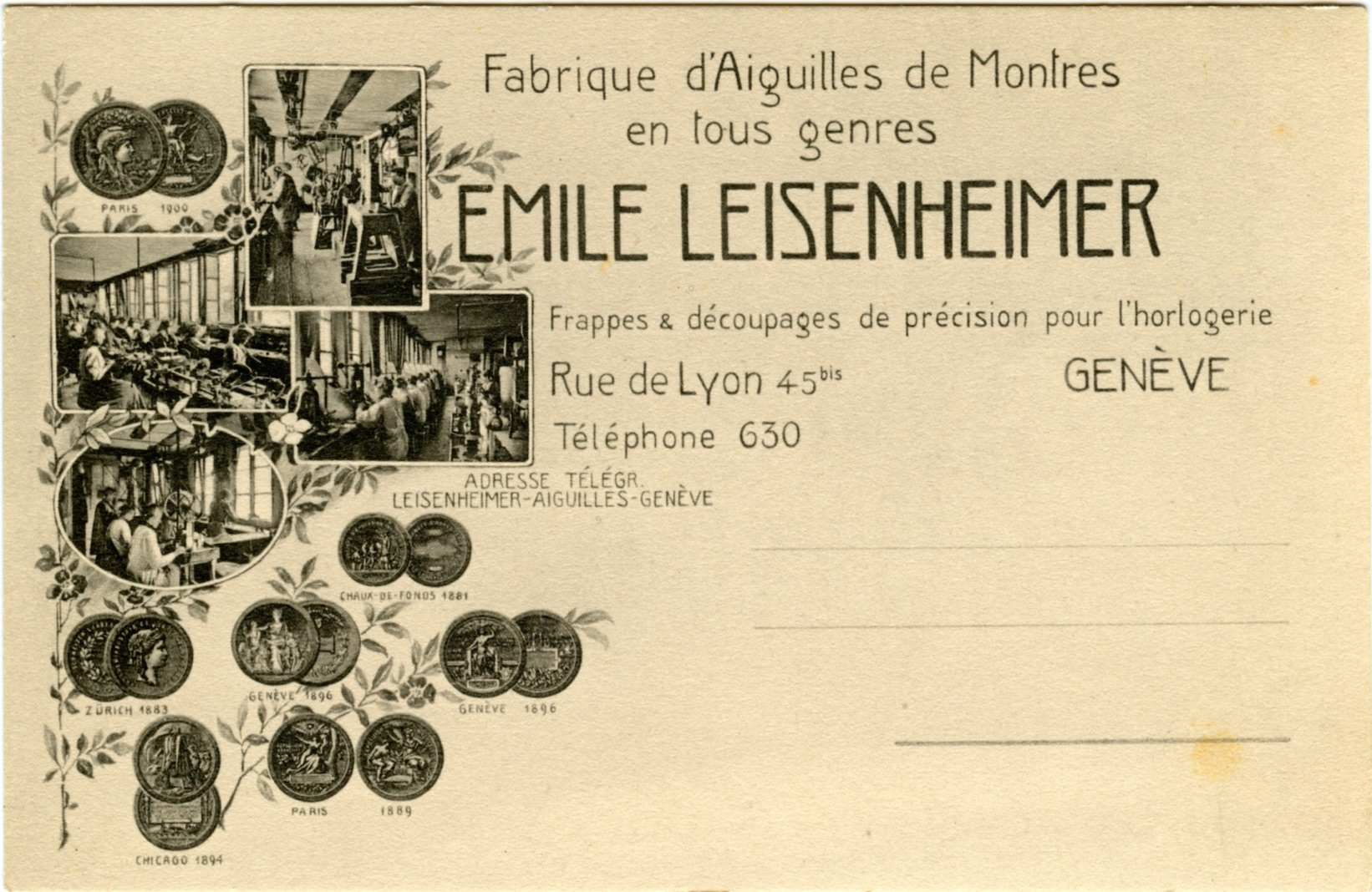 Carte postale publicitaire pour la fabrique d'aiguilles de montres fondée par Valentin Leisenheimer (1811-1891) en 1848 à Genève. Elle porte le nom du directeur d'alors, Émile Leisenheimer (1853-1913), fils de Valentin. « Fabrique d’Aiguilles de Montres en tous genres / Émile Leisenheimer / Frappes et découpages de précision pour l’horlogerie / Rue de Lyon 45bis, Genève / Téléphone 630 / Adresse télégr. / Leisenheimer-Aiguilles-Genève ». La carte porte quatre petites reproductions de photographies des ateliers, où l’on distingue au moins 25 employés dans quatre locaux différents. Les médailles reçues par la fabrique sont reproduites recto-verso avec le lieu et l’année : La Chaux-de-Fonds 1881, Zurich 1883, Paris 1889, Chicago 1894, Genève 1896 (2 fois), Paris 1900. Papier fort, 14 x 9 cm. La maison Leisenheimer est devenue la maison Fiedler en 1918.